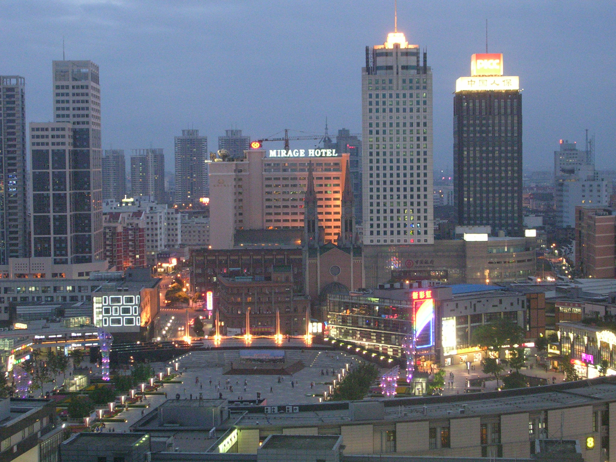 Ningbo Tianyi Square, 2005